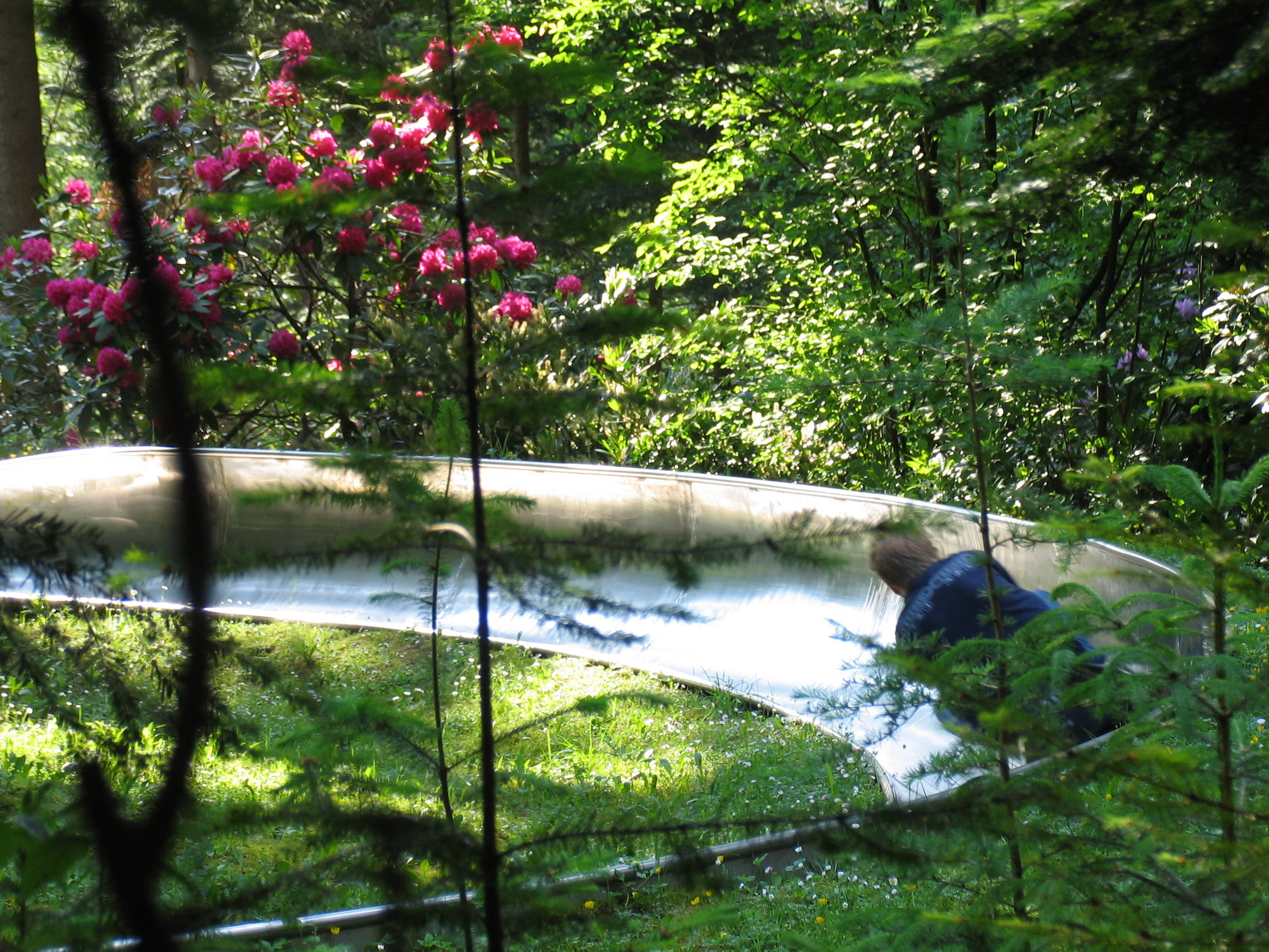 Sommerrodelbahn Panoramapark, Germany